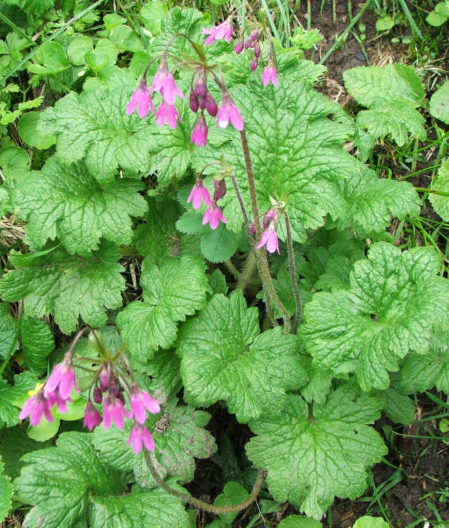 Cortusa matthioli (pl. zarzyczka górska), habitat: Tatry Mountains, Dolina Waksmundzka